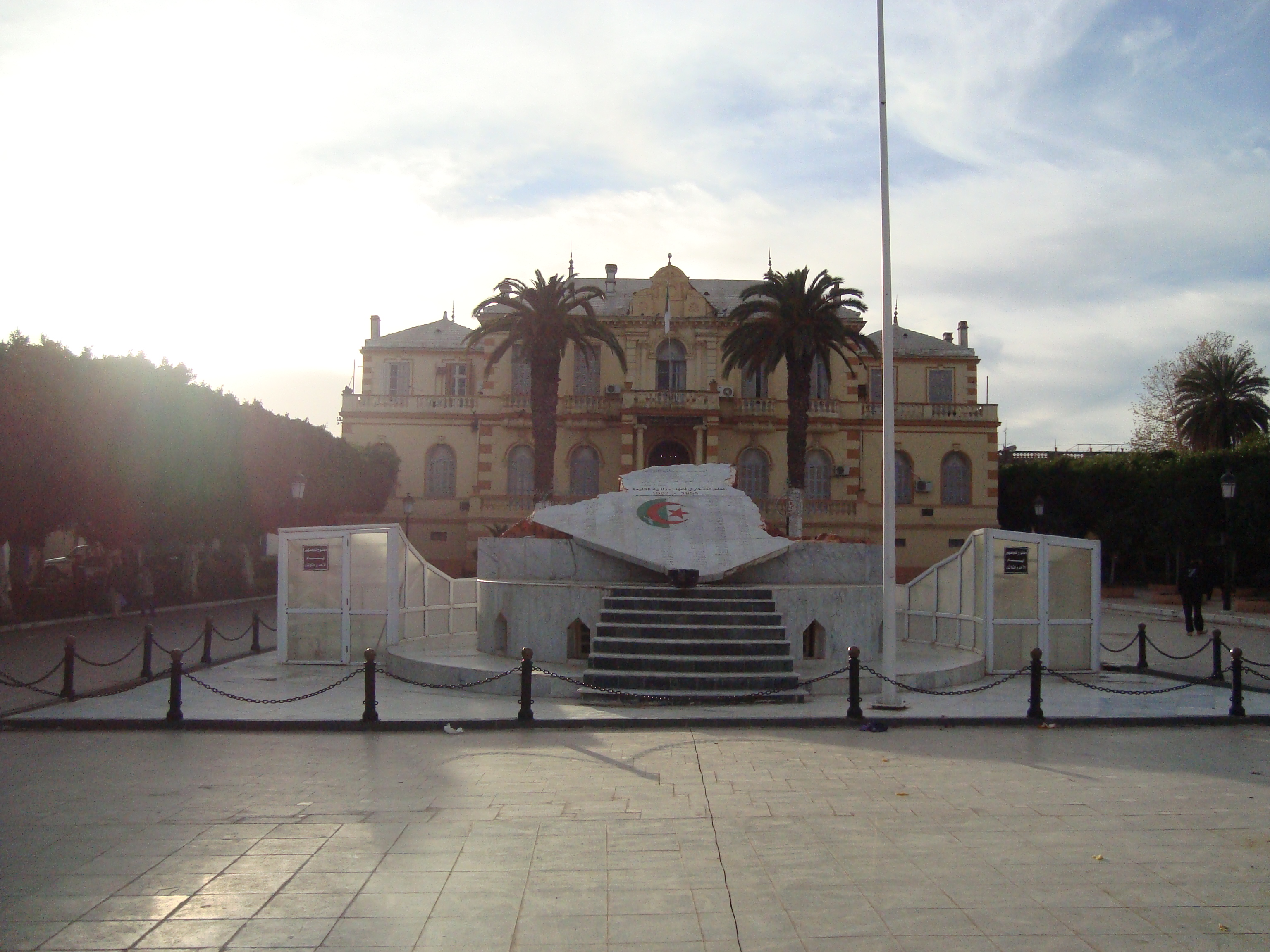 Vue sur mairie de Koléa — Tipaza Province.